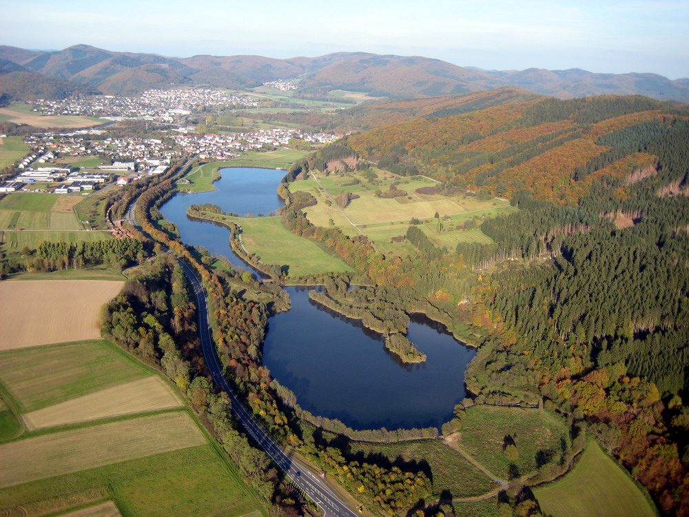 Perfstausee im Herbst